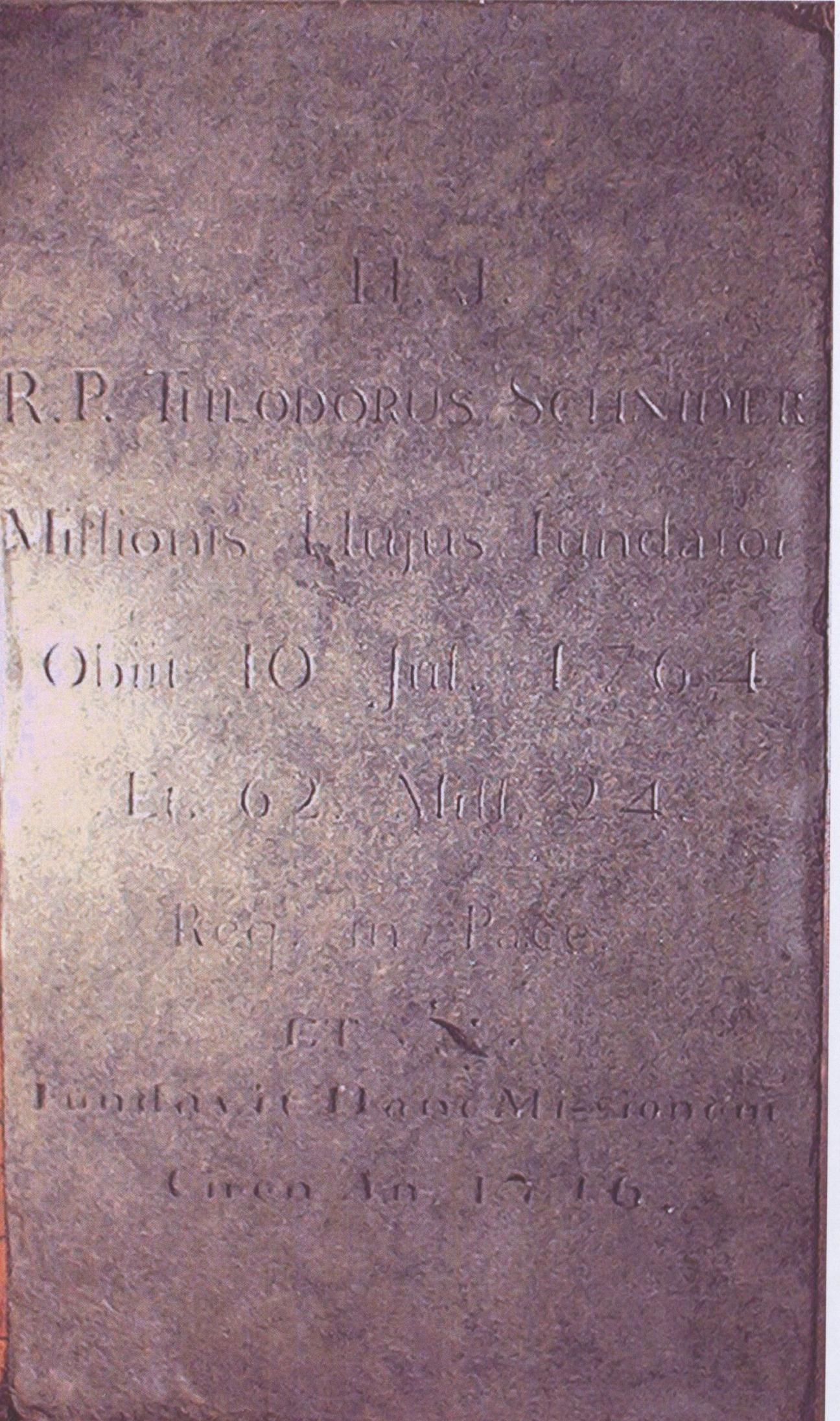 Brab von pater Theodor Schneider, Pfalz, Pennsylvanien